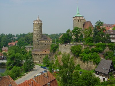 Bautzen, Stadtansicht über die Spree